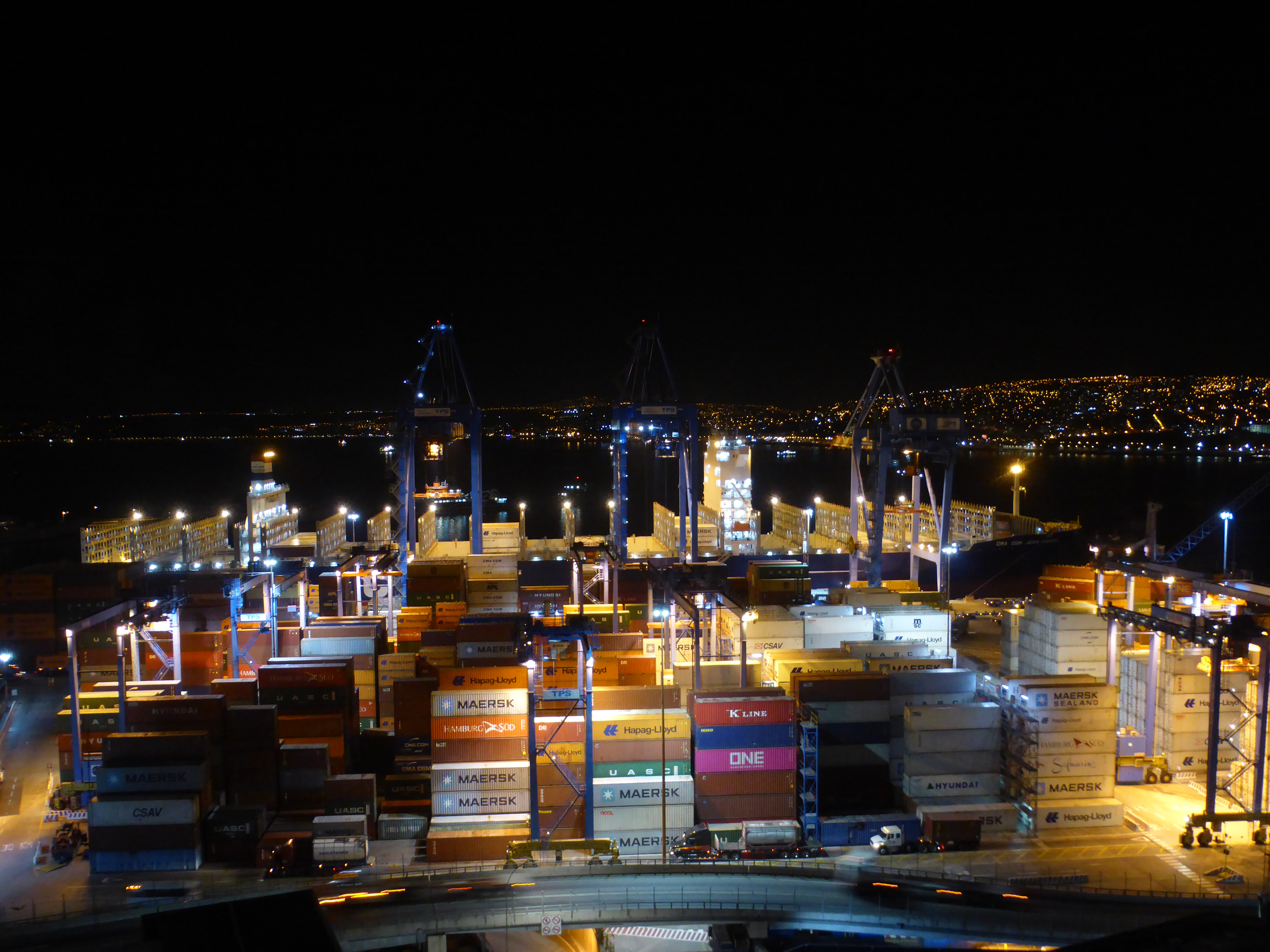 Puerto de Valparaíso desde el cerro Artillería, de noche. Buque portacontenedores "CMA CGM JEAN GABRIEL" (IMO 9729128), matriculado en el puerto maltés "Valletta" (La Valeta). Atracado en el muelle, descargando contenedores.